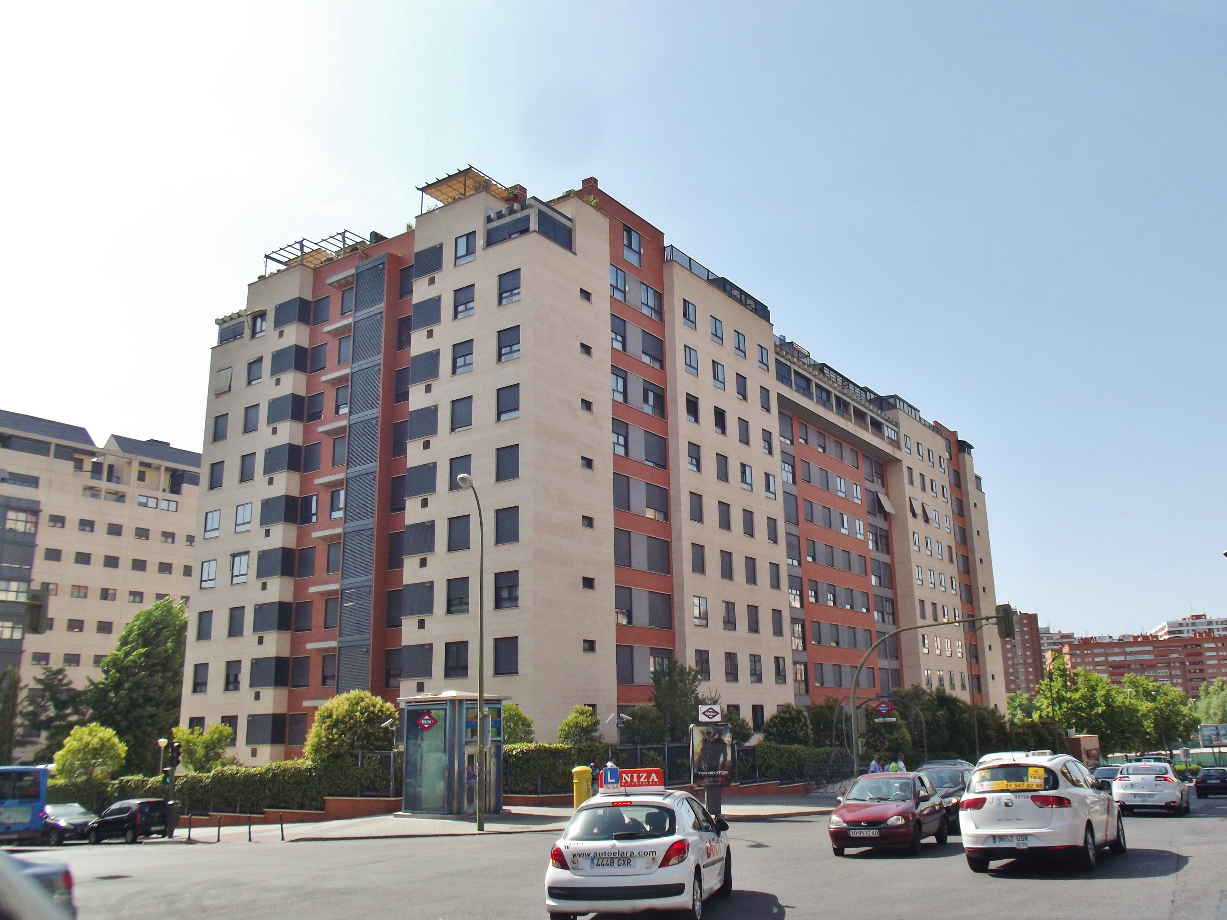 Vista del Edificio entre C/de la Bañeza Av/ Monforte de Lemos y C/ Ganapanes